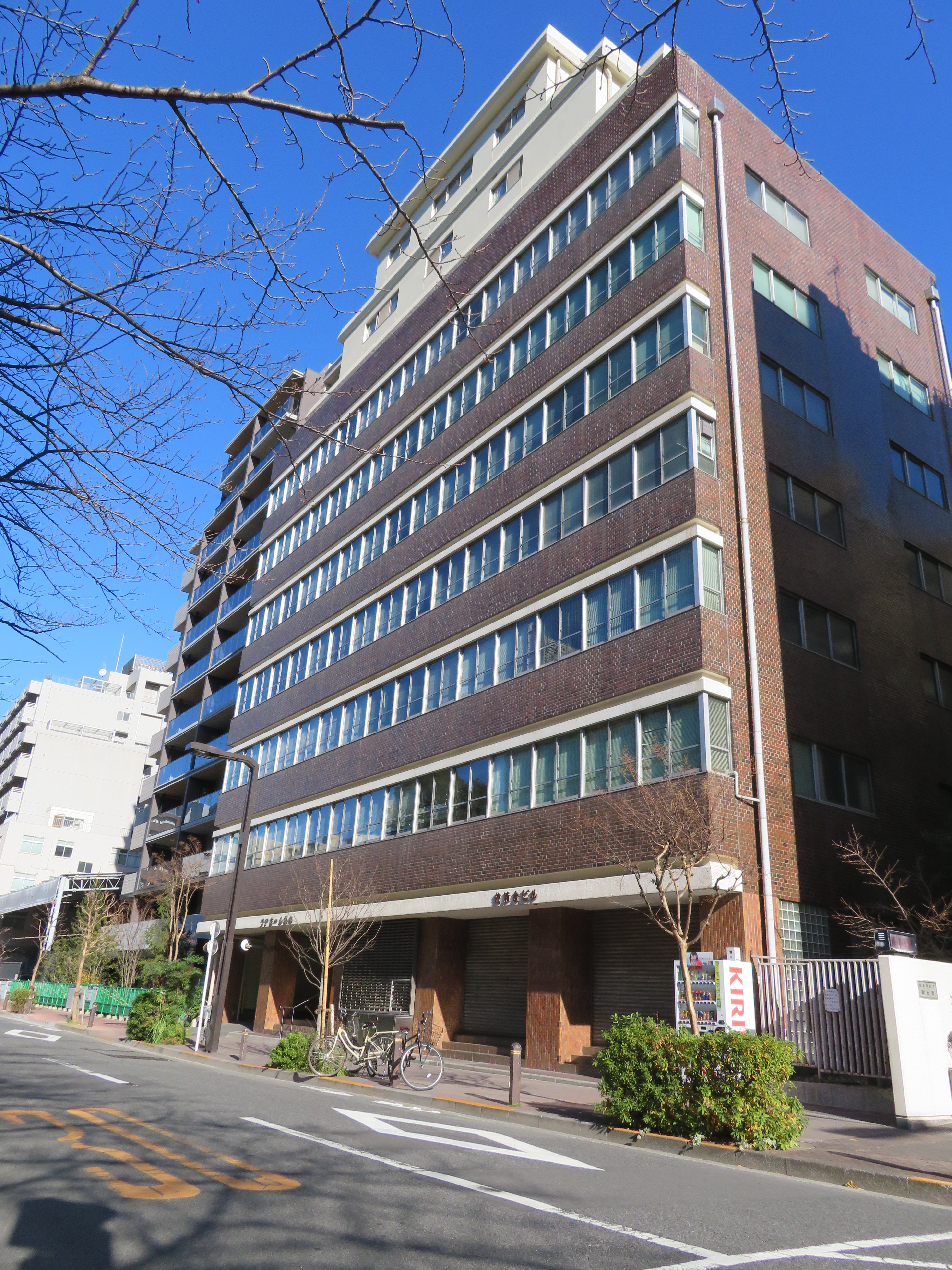 東京都中央区に所在する掖済会ビル Canon PowerShot SX720 HS